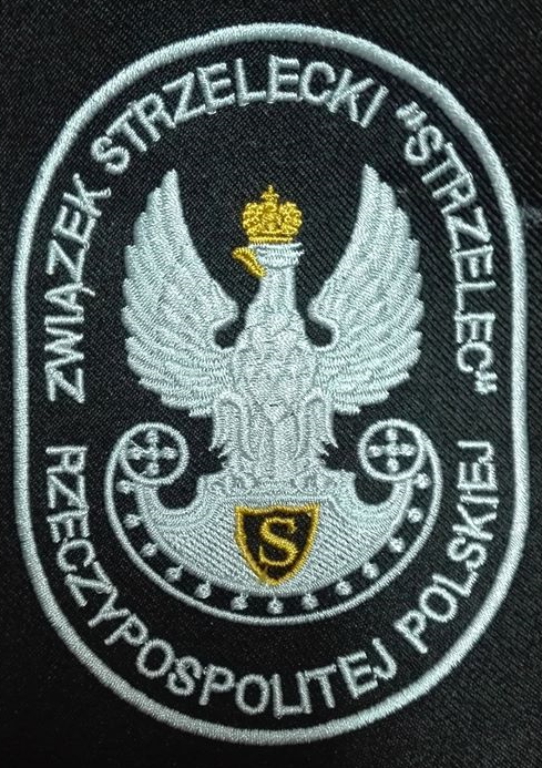 Oznaka taktyczna ZS"S” RP